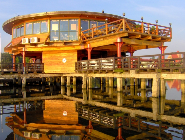 Restauracja Bursztynia na puckim molo, lato 2006 Restaurant on pier in Puck, Poland, summer 2006 Autor: Krzysztof